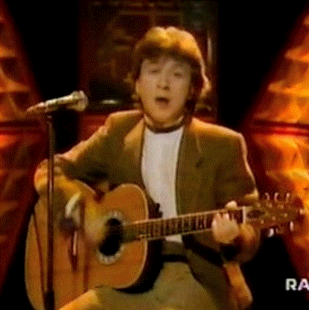 v